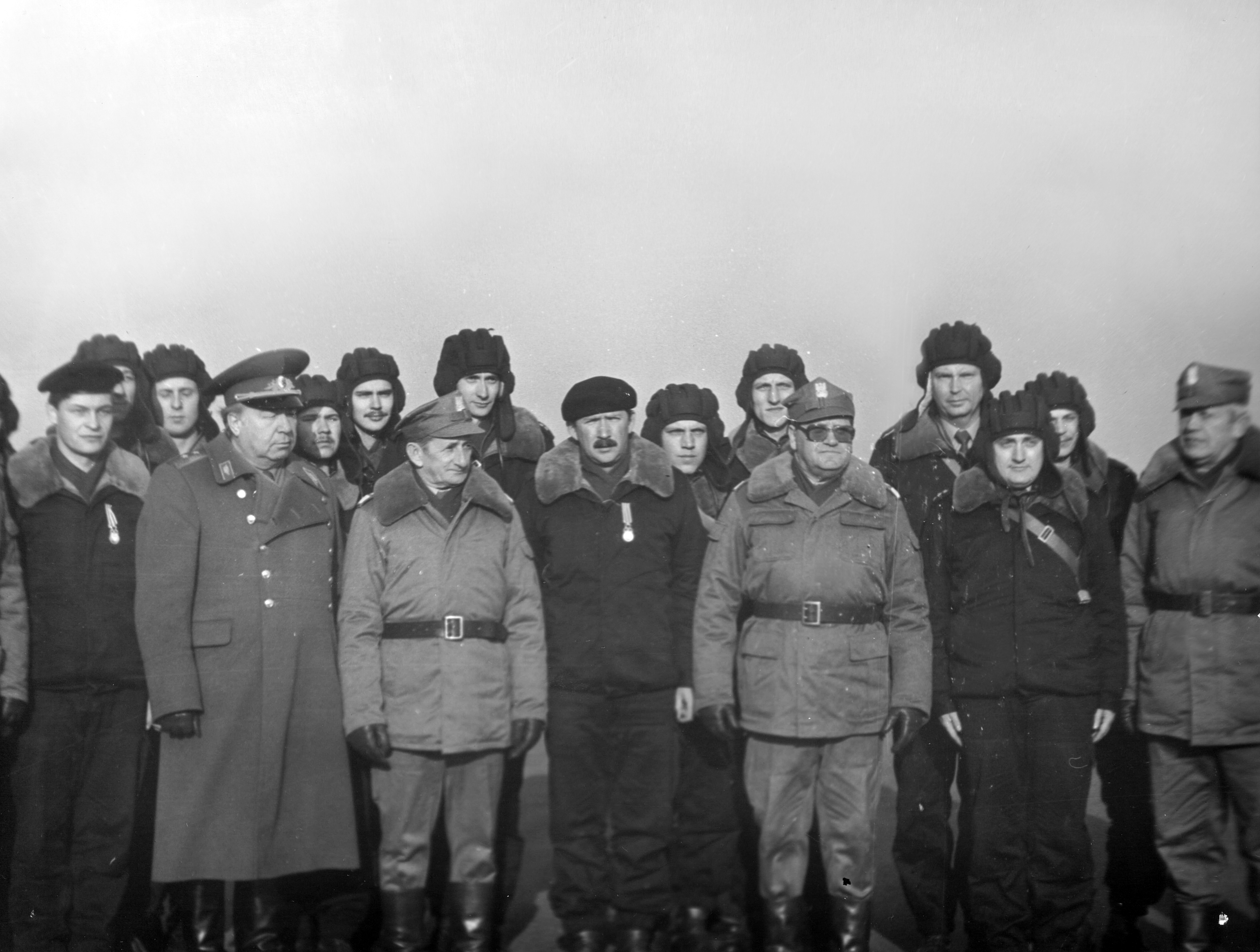 Żołnierze Wojska Polskiego na poligonie rakietowym. Pierwszy start rakiety Toczka 10.11.1988 r.